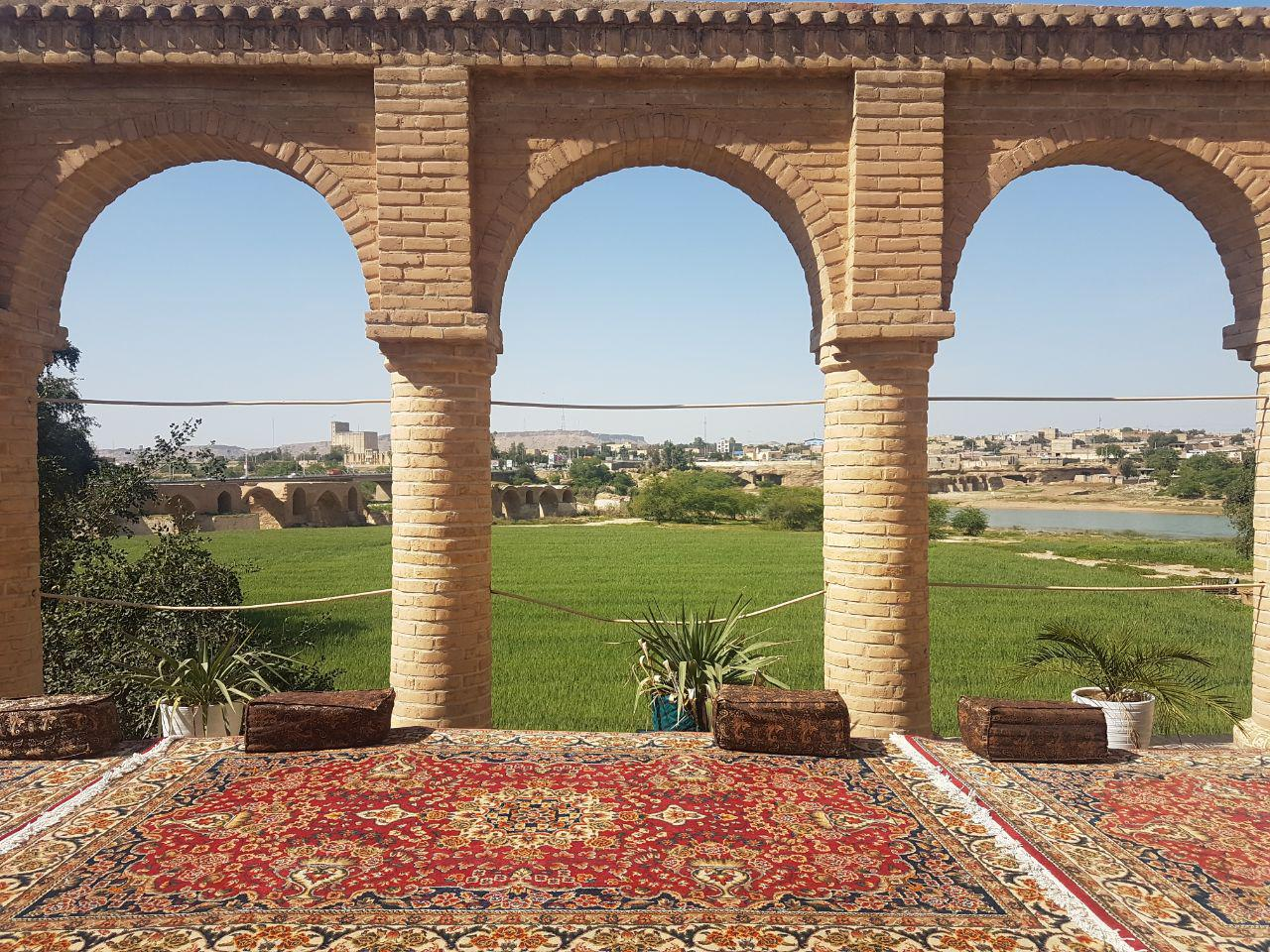 خانه مستوفی شوشتر - ۱۳۹۶